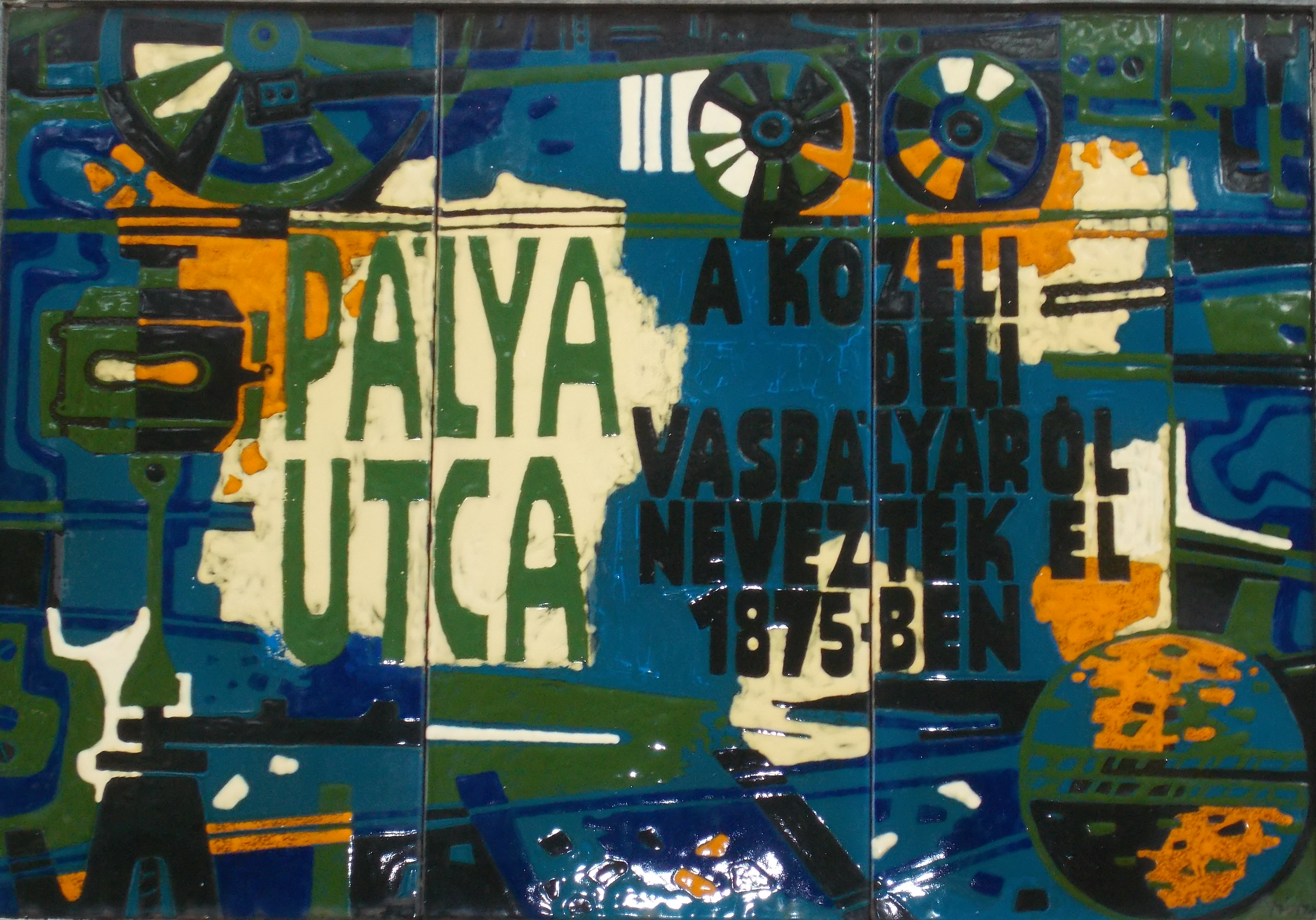 Pálya utcanévtábla (Túry Mária, 1976). Három színes tűzzománc lap, vaskeretben, kb 1m szer fél méter, vasúti közlekedésre utaló képe. Felirat: 'Pálya utca a közeli déli vaspályáról nevezték el 1875-ben.' - Budapest XII., Pálya utca